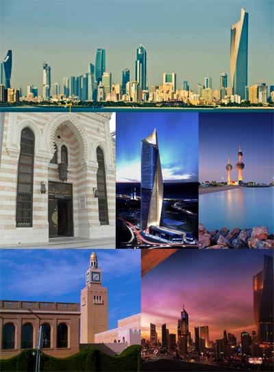 مجموعة من صور مدينة الكويت